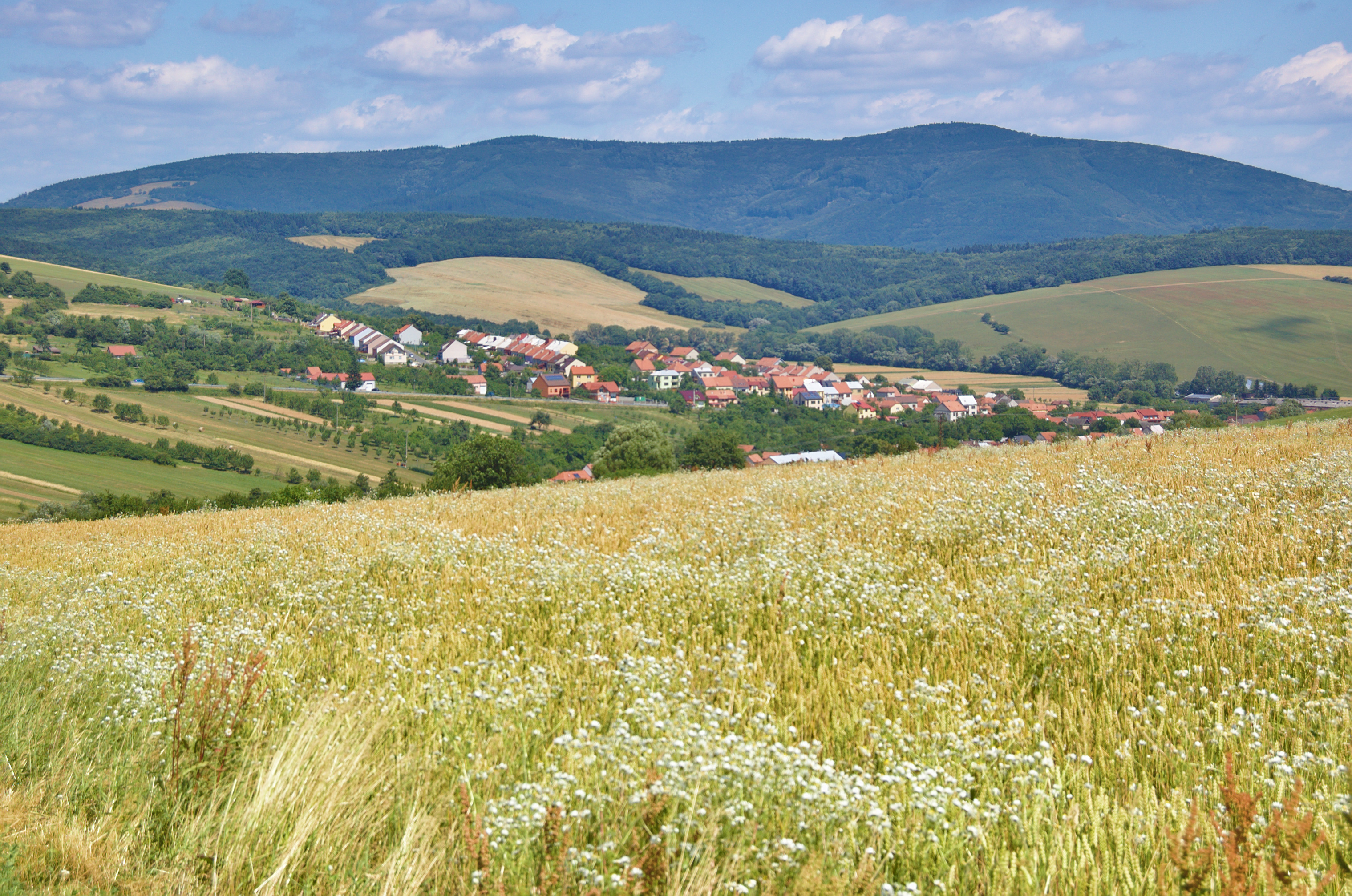 Pohled na Velký a Malý Lopeník od Strání, okres Uherské Hradiště